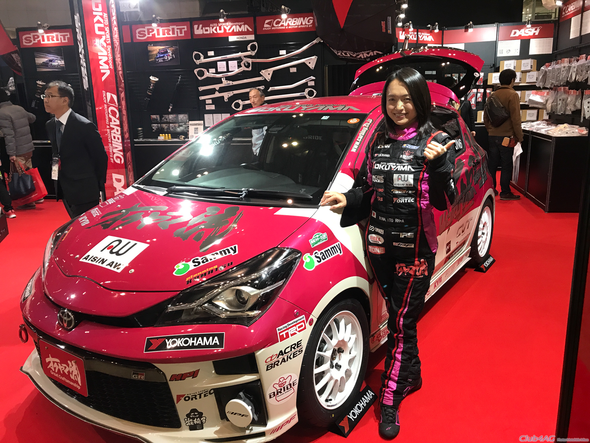 Tokyo Auto Salon 2019